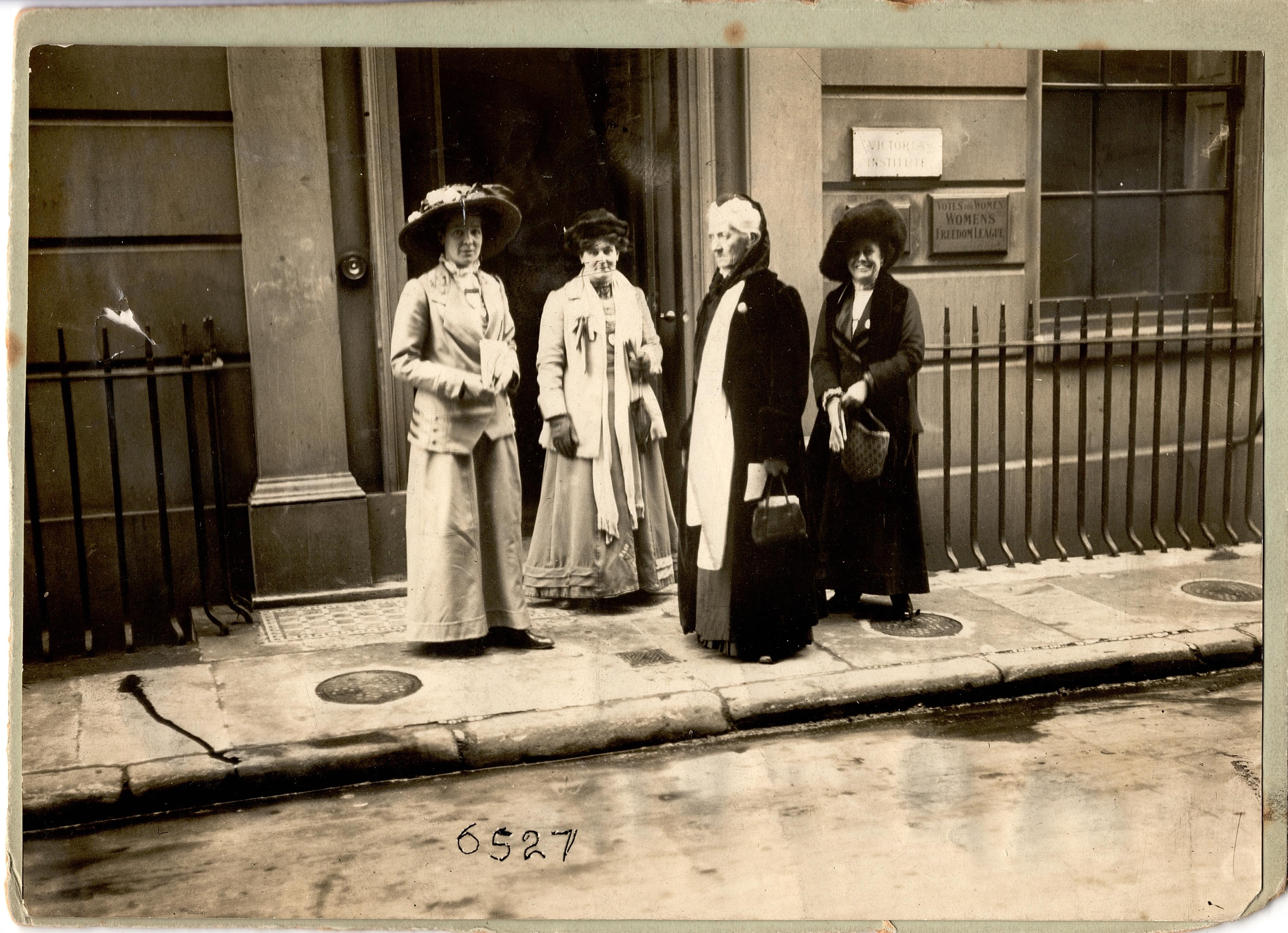 twl 2004 246